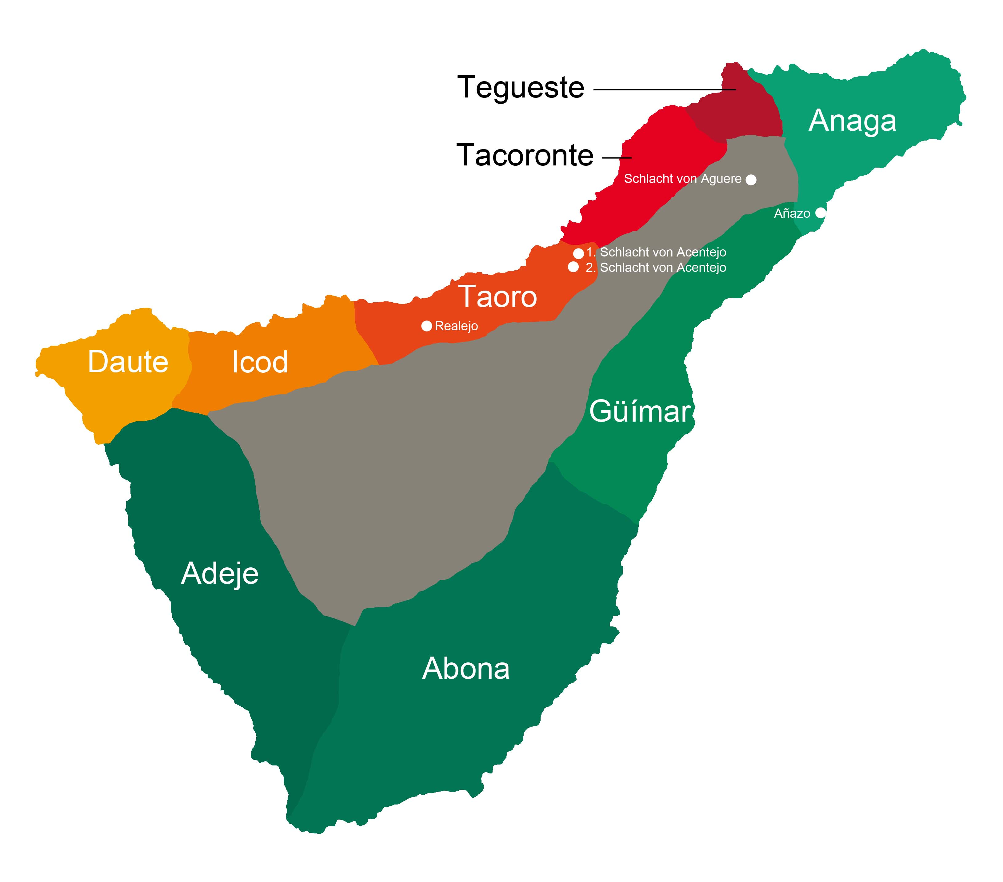 Menceyatos en Tenerife 1496